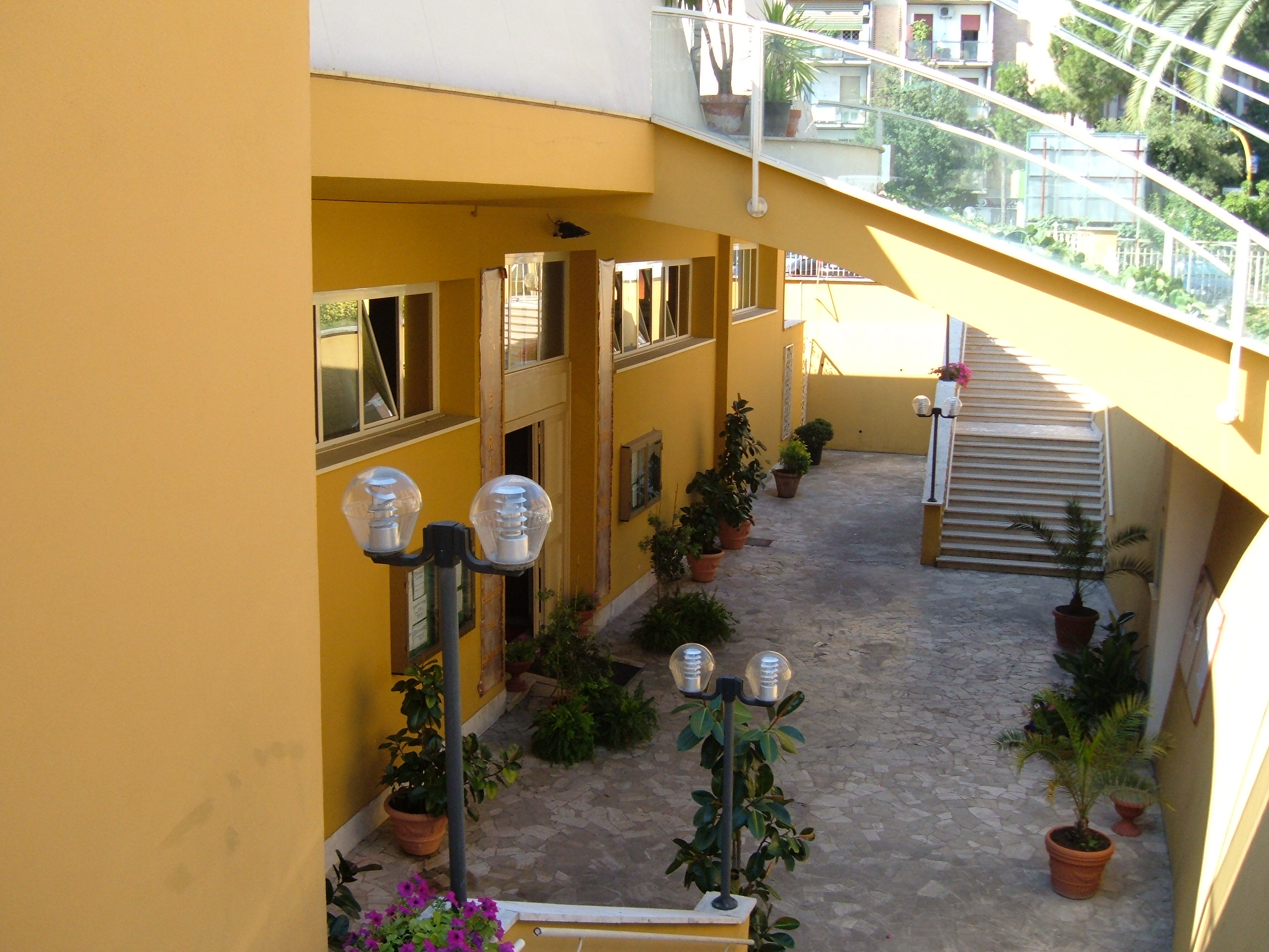 Chiesa di San Giulio, a Roma, nel quartiere Gianicolense. Entrata.